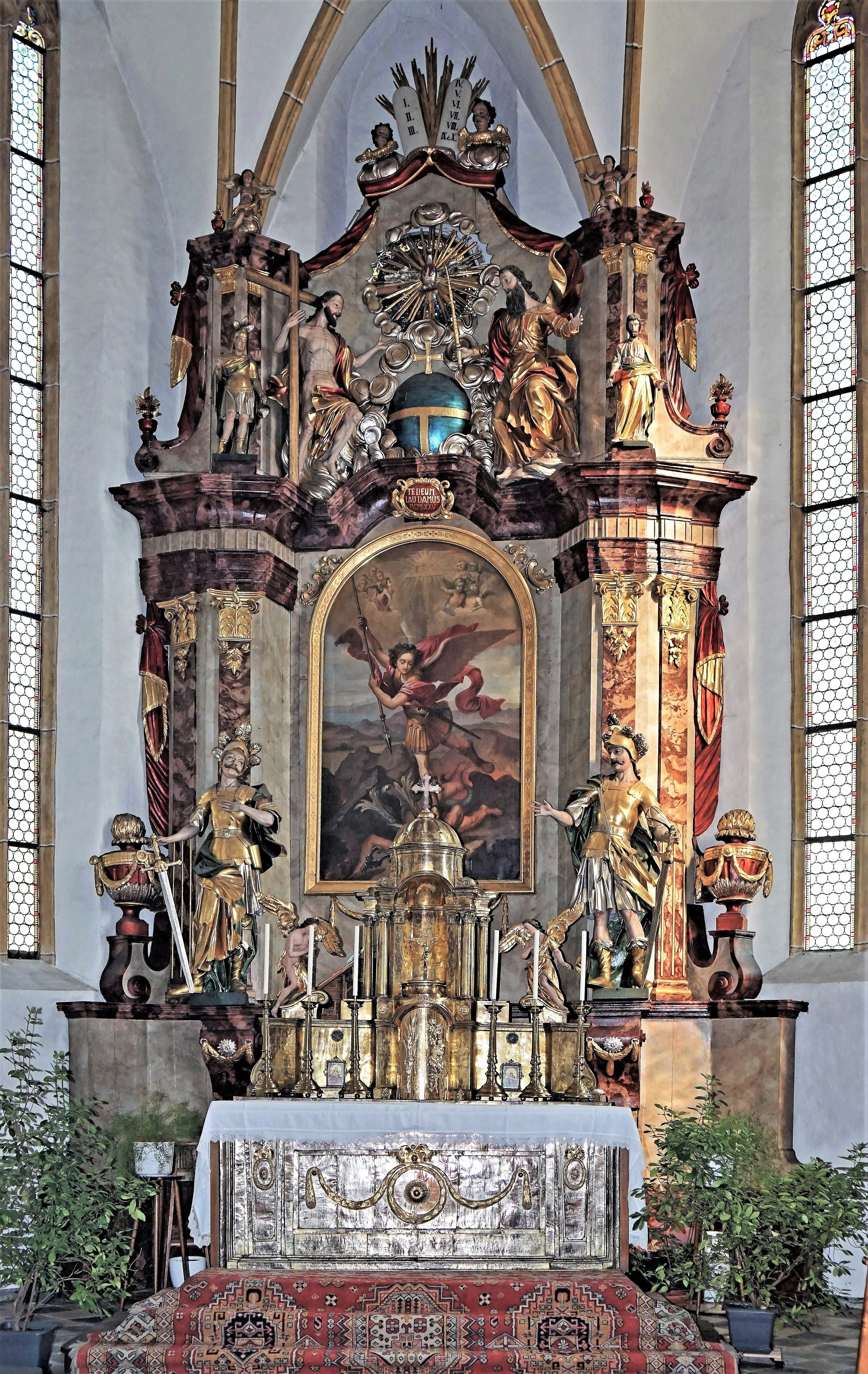 Kath. Pfarrkirche St. Michael ob Bleiburg, barocker Hochaltar